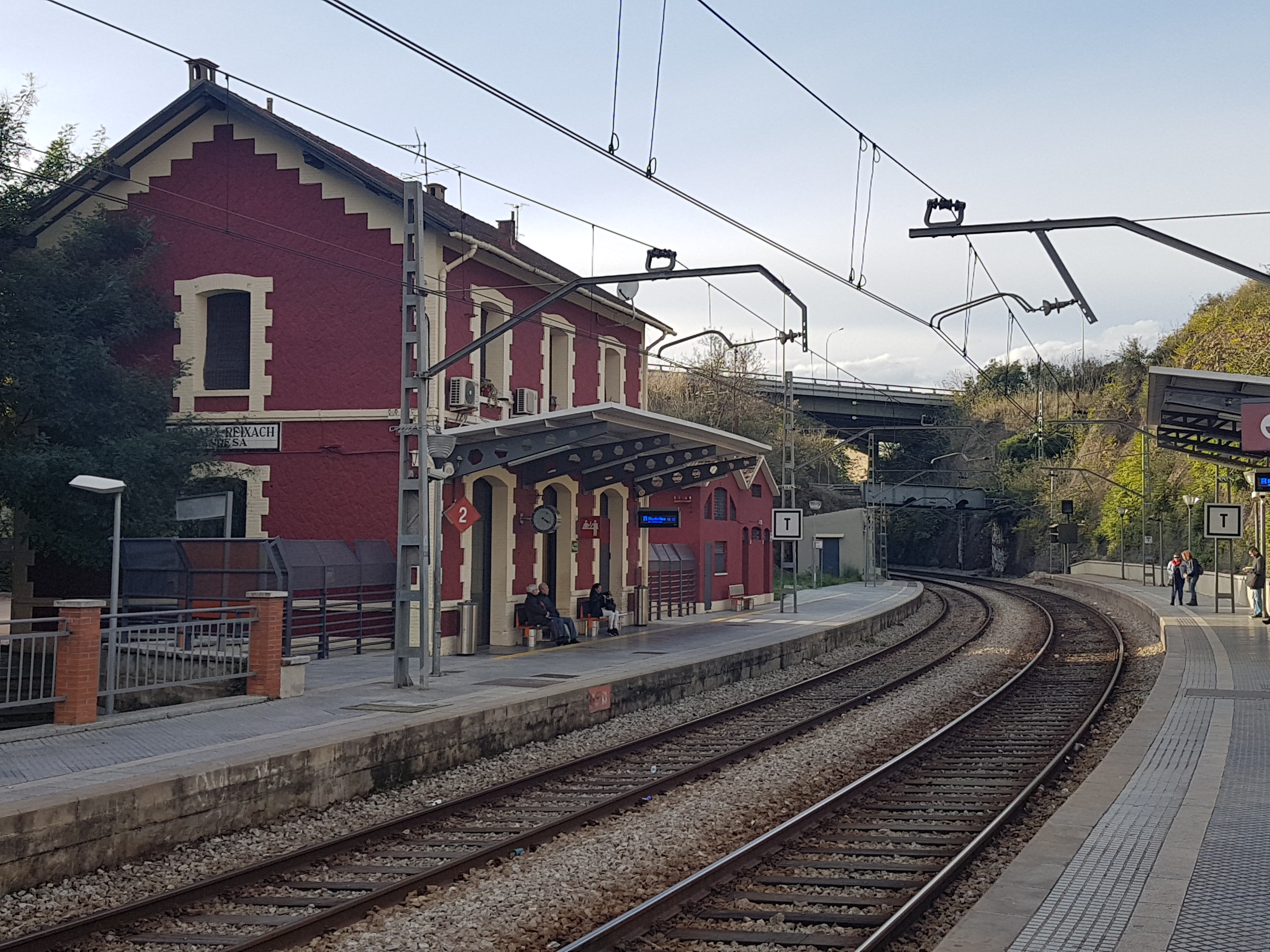 Estació de Montcada i Reixac-Manresa de la línia Barcelona-Manresa-Lleida